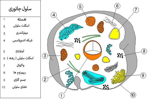 سلول جانوری فارسی